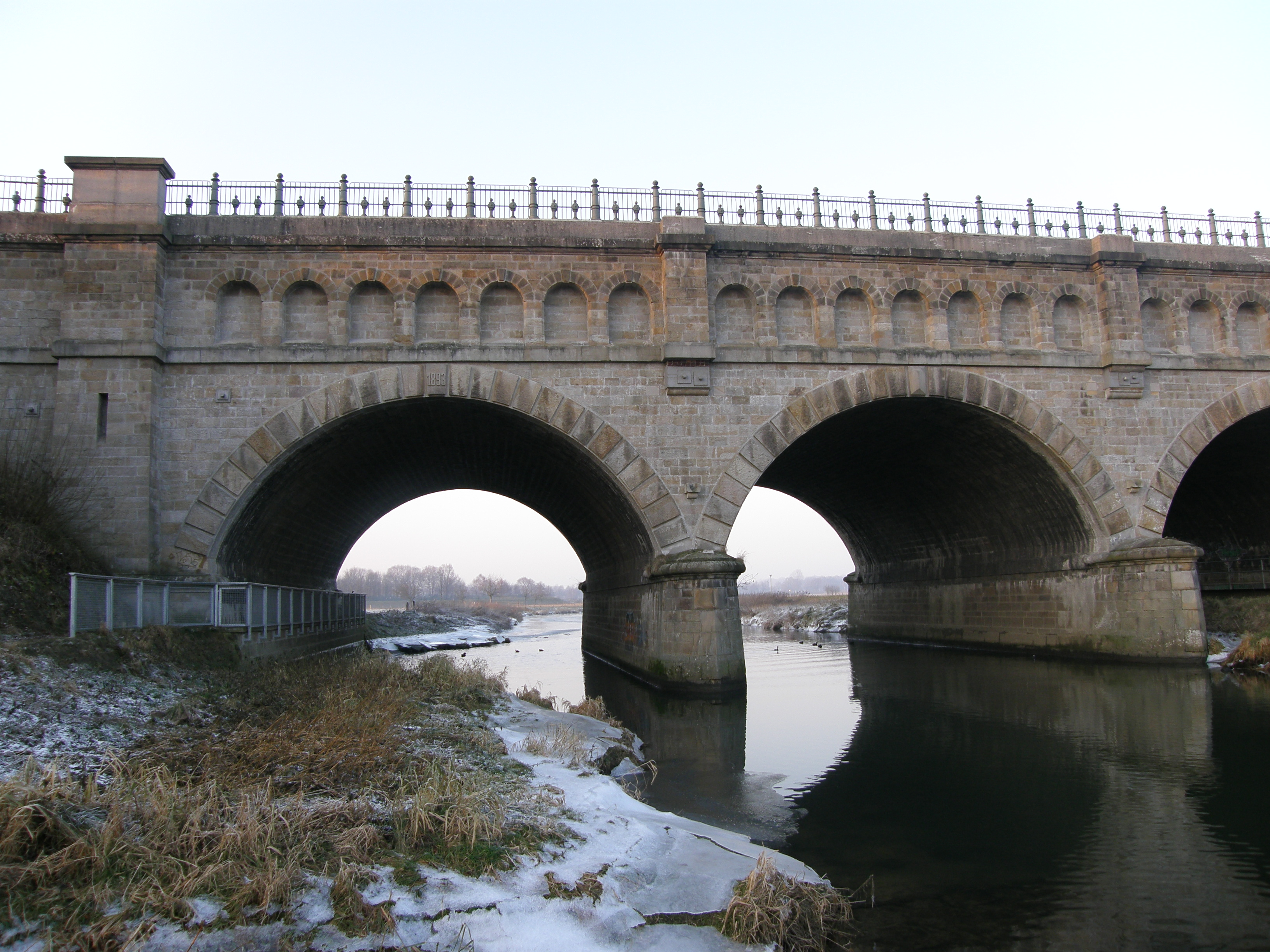 Brücke der Alten Fahrt des Dortmund-Ems-Kanals in Olfen über die Stever.